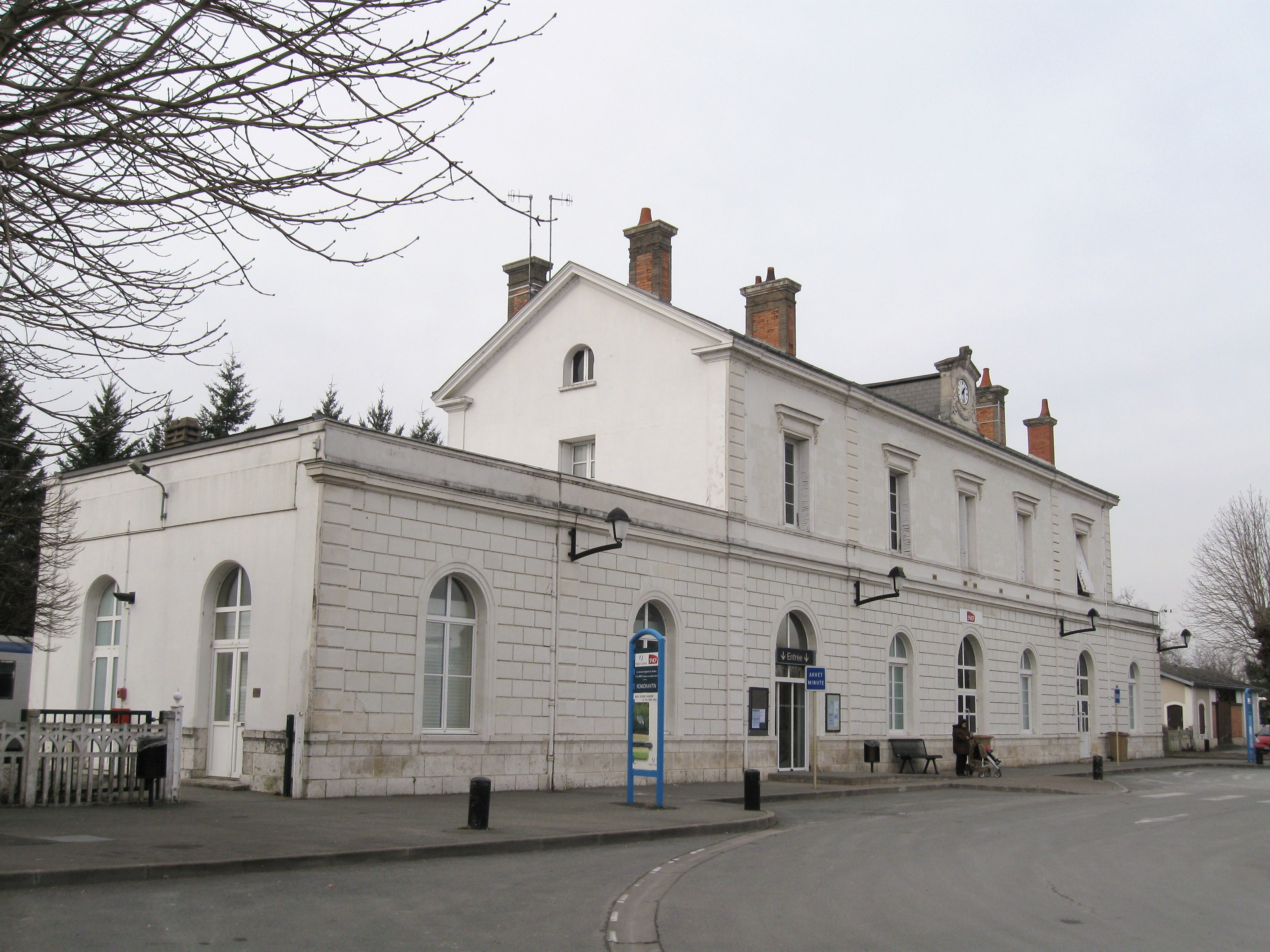 Gare de Romorantin-Blanc-Argent, Romorantin-Lanthenay, Loir-et-Cher, France